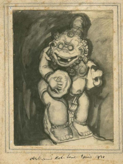 Foto. Delem, Panakawan, bediende van Karawa in een tempel bij Sawan, Bali 1927, houtskooltekening door Charles Sayers